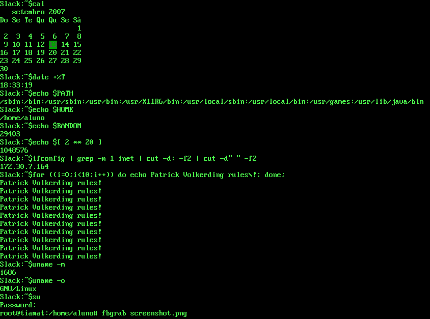 bashing